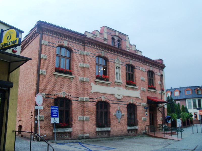 Dom przy ulicy Józefowskiej w Katowicach-Józefowcu